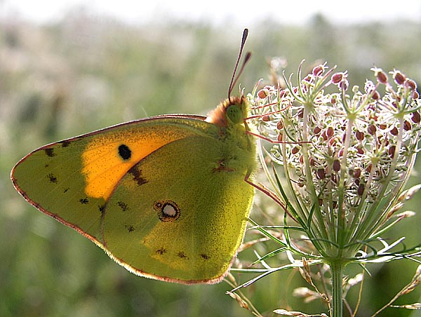 Postillion (colias crocea), aufgenommen auf einer Wiese in der Nähe von Oppenrod